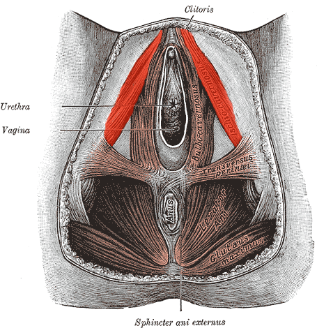 Ischiocavernosus muscle (female)